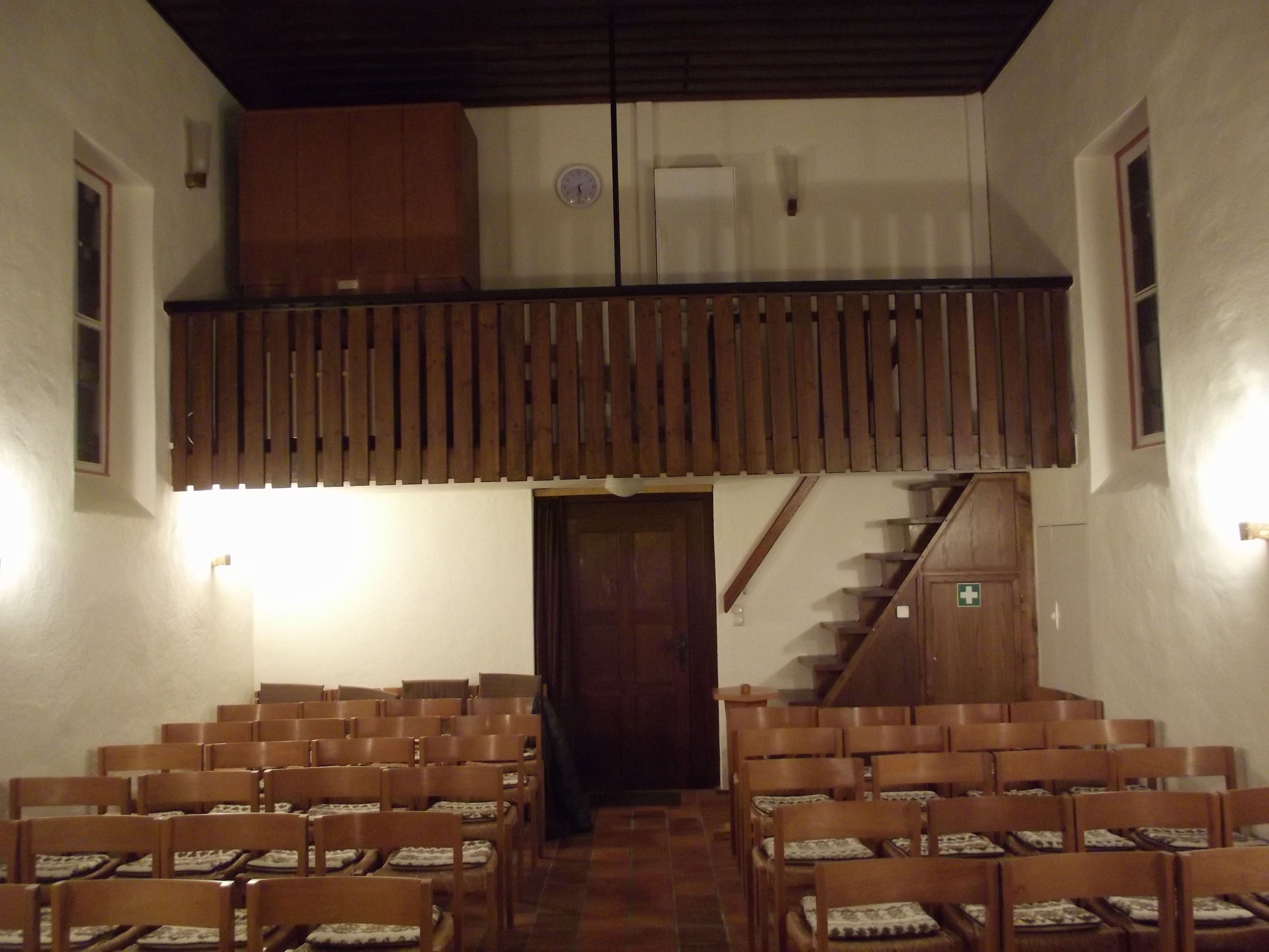 Katharinen-Kapelle in Steinheim (Hungen), Landkreis Gießen, Hessen